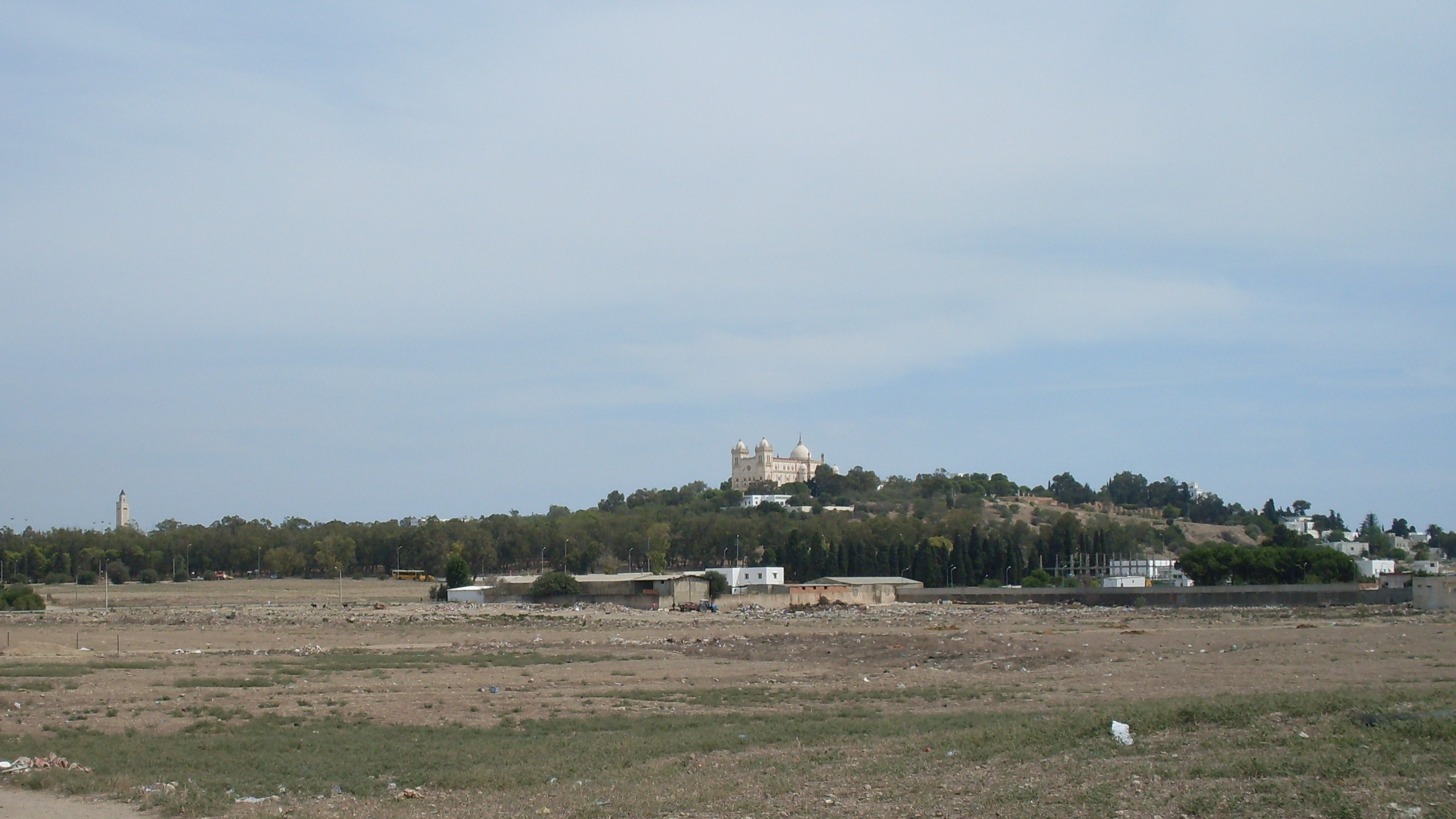 Tunisie, Emplacement du cirque de Carthage au premier plan